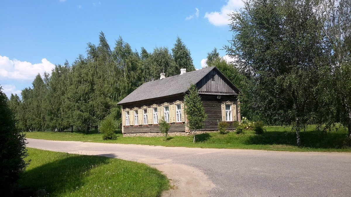 Строчыца. БДМНАБ. Дом з вуліцы Вызвалення, 4